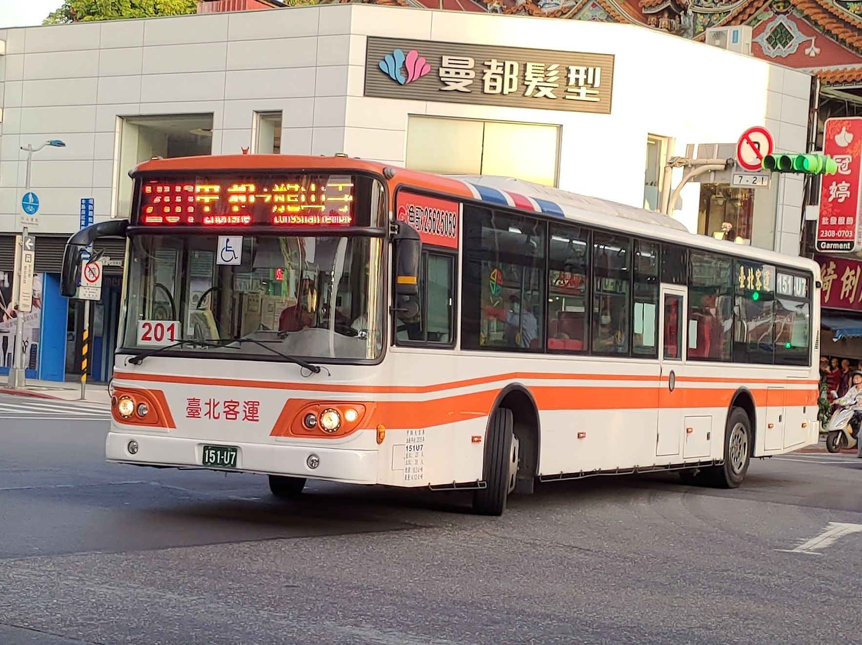 2015年成運大宇五期低地板